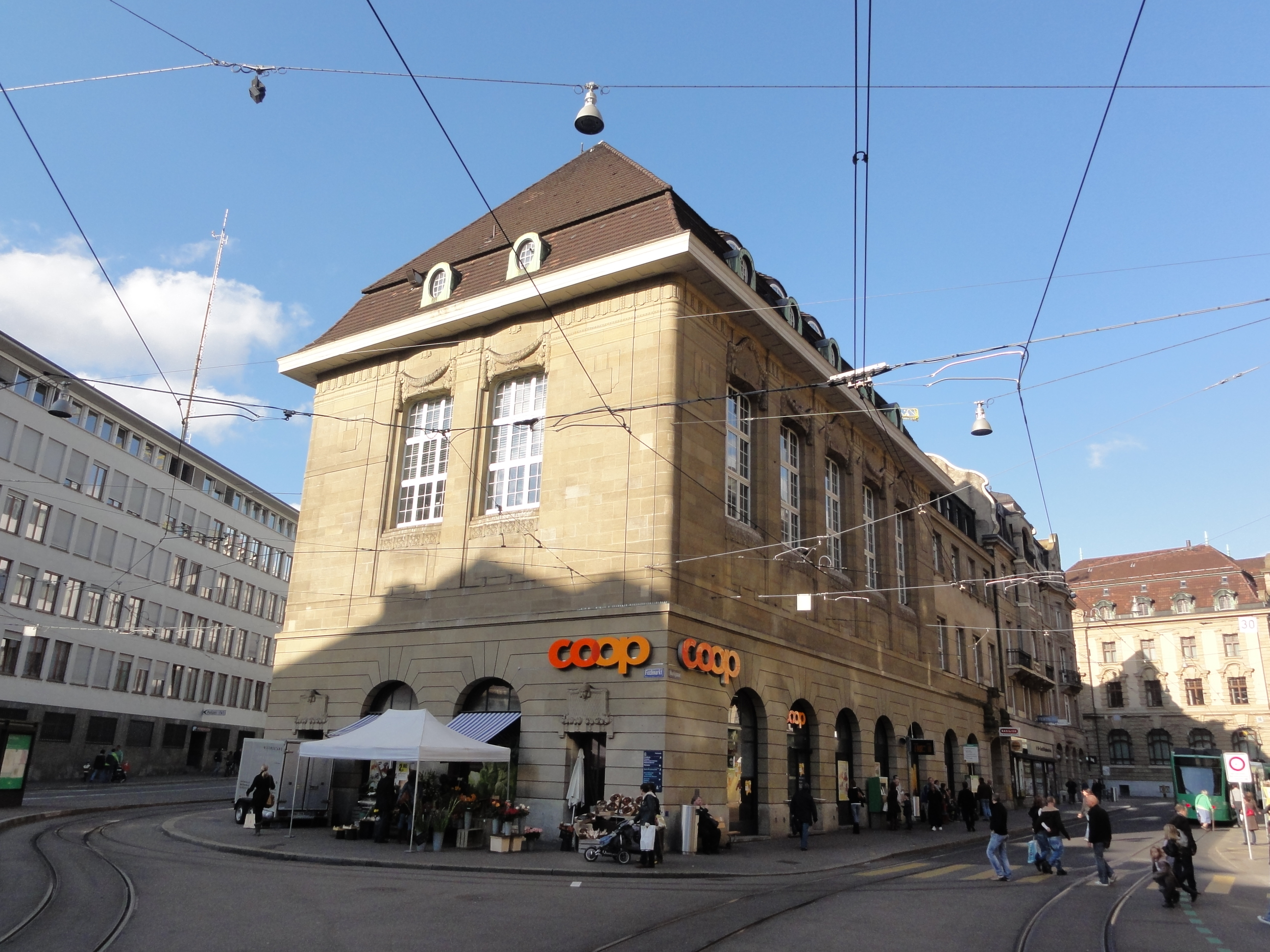 Basel — Fischmarkt — Eckgebäude (EG: Coop-Supermarkt)